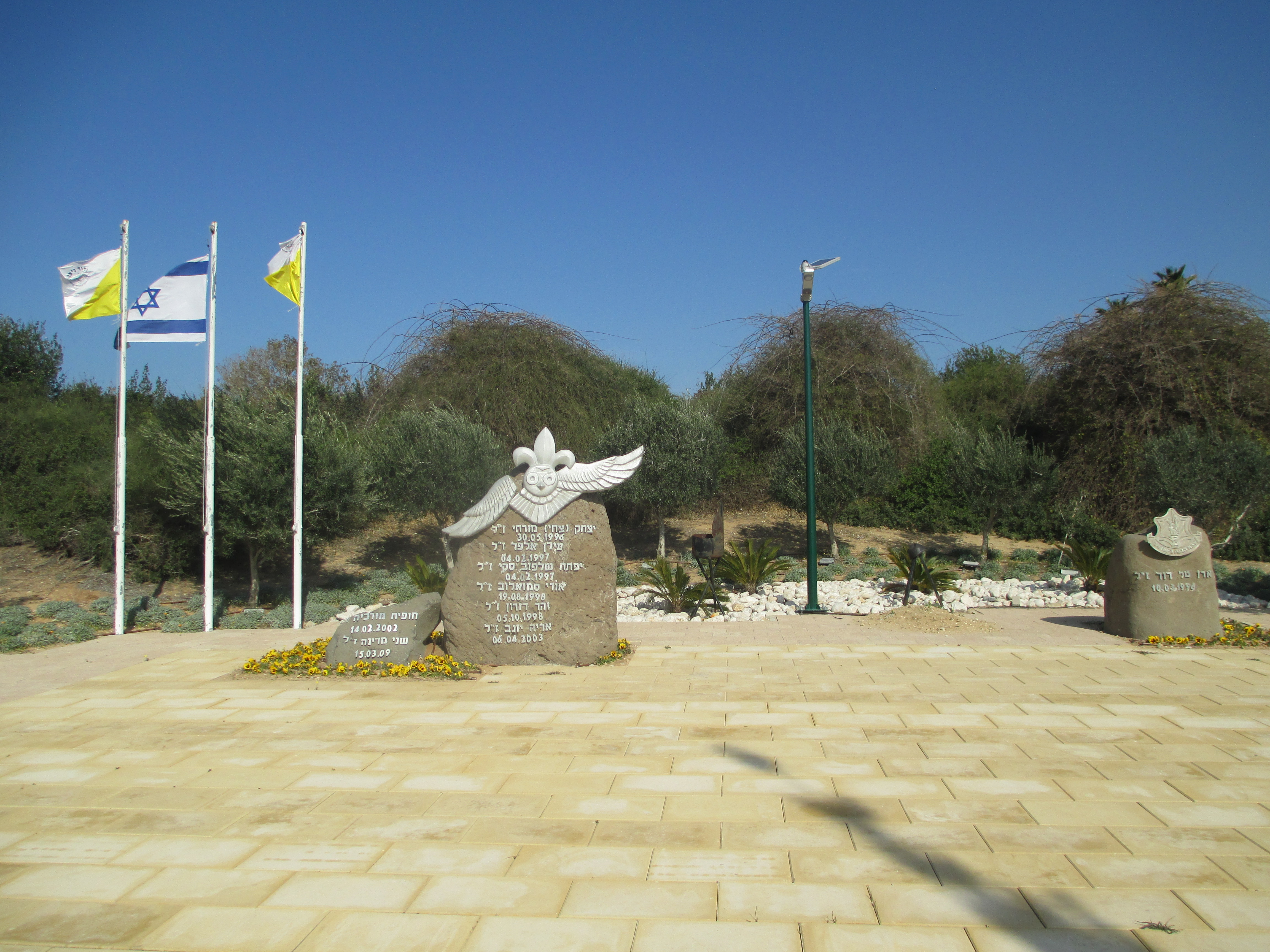 אנדרטת גדוד האיסוף הקרבי ניצן 636 בקיסריה